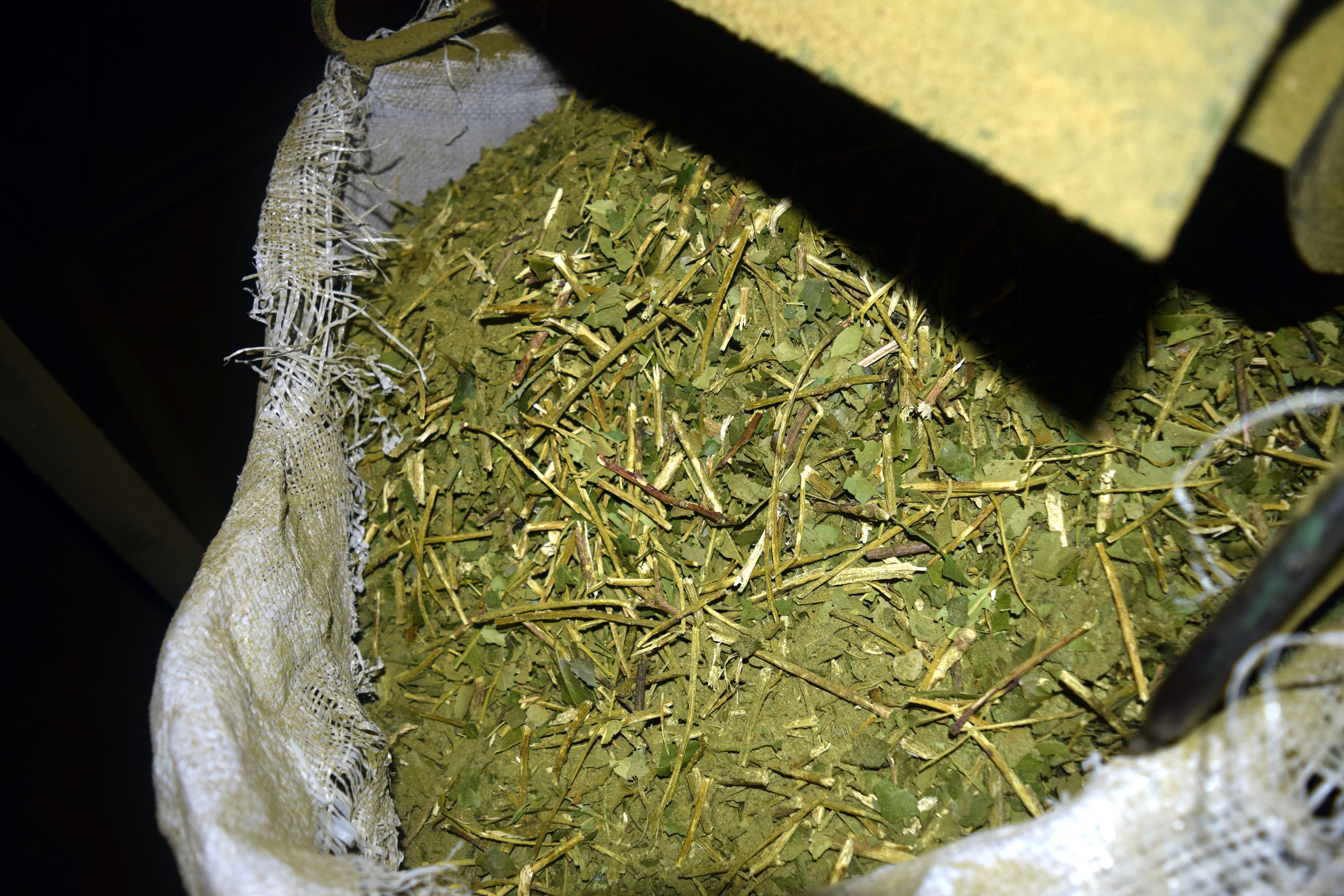 Yerba Mate luego de su proceso de canchado y previo a su envío al molino en un secadero de la localidad de Campo Ramón, Misiones, Argentina.